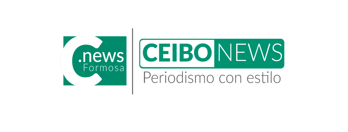 Logo oficial del diario digital de la provincia de Formosa, República Argentina